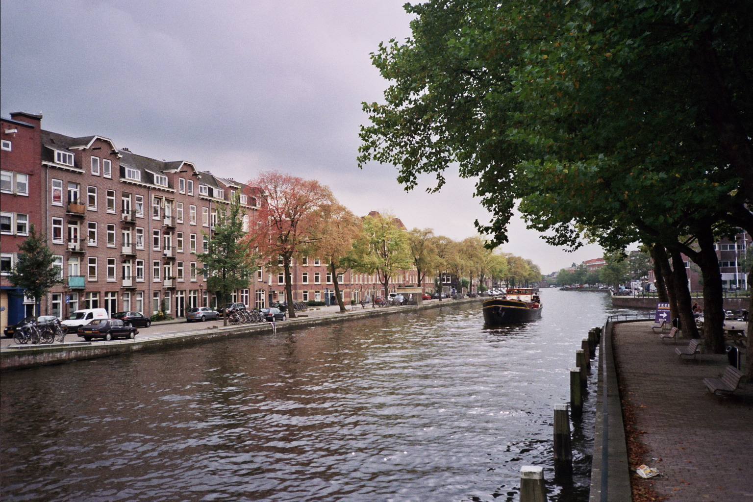 Kostverlorenvaart, Amsterdam-West. gezien vanaf de kade bij de Postjesweg , in de richting van de Overtoomse Sluis. Links de 2e Kostverlorenkade, rechts (buiten beeld) gebouw Het Sieraad.